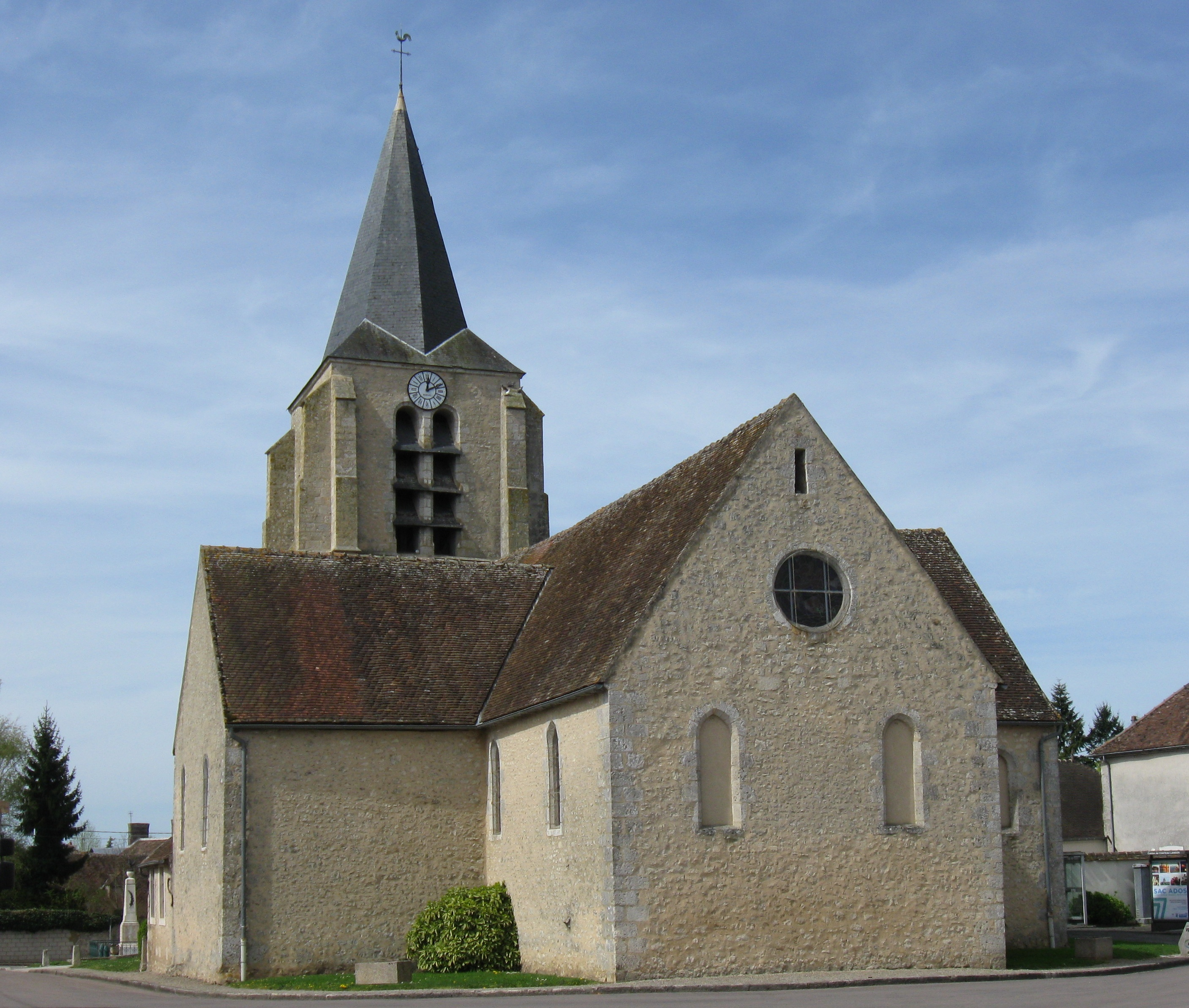 Église Saint-Pierre-et-Saint-Paul de Chaintreaux. (Seine-et-Marne, région Île-de-France).